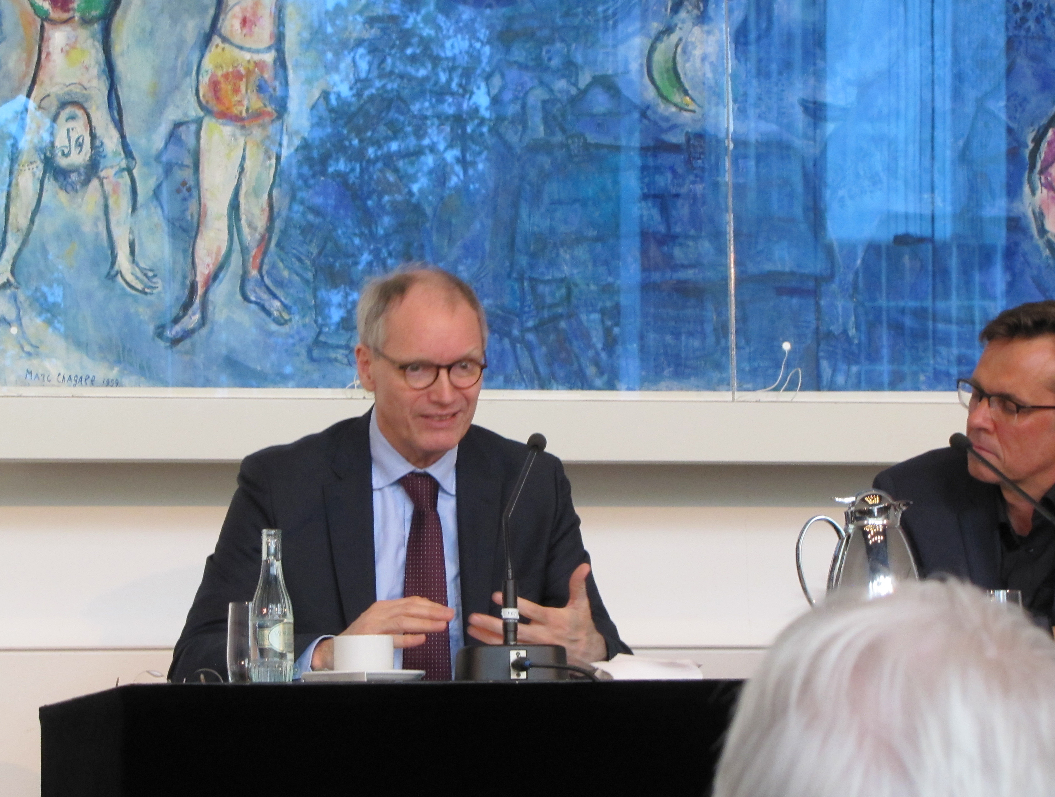 Stefan Kadelbach und Alf Mentzer, bei den 47. Römerberggesprächen, Thema:Last Exit nach dem Brexit Ist Europa noch zu retten?", im Mai 2019 im Chagall-Saal der Städtischen Bühnen in Frankfurt am Main.